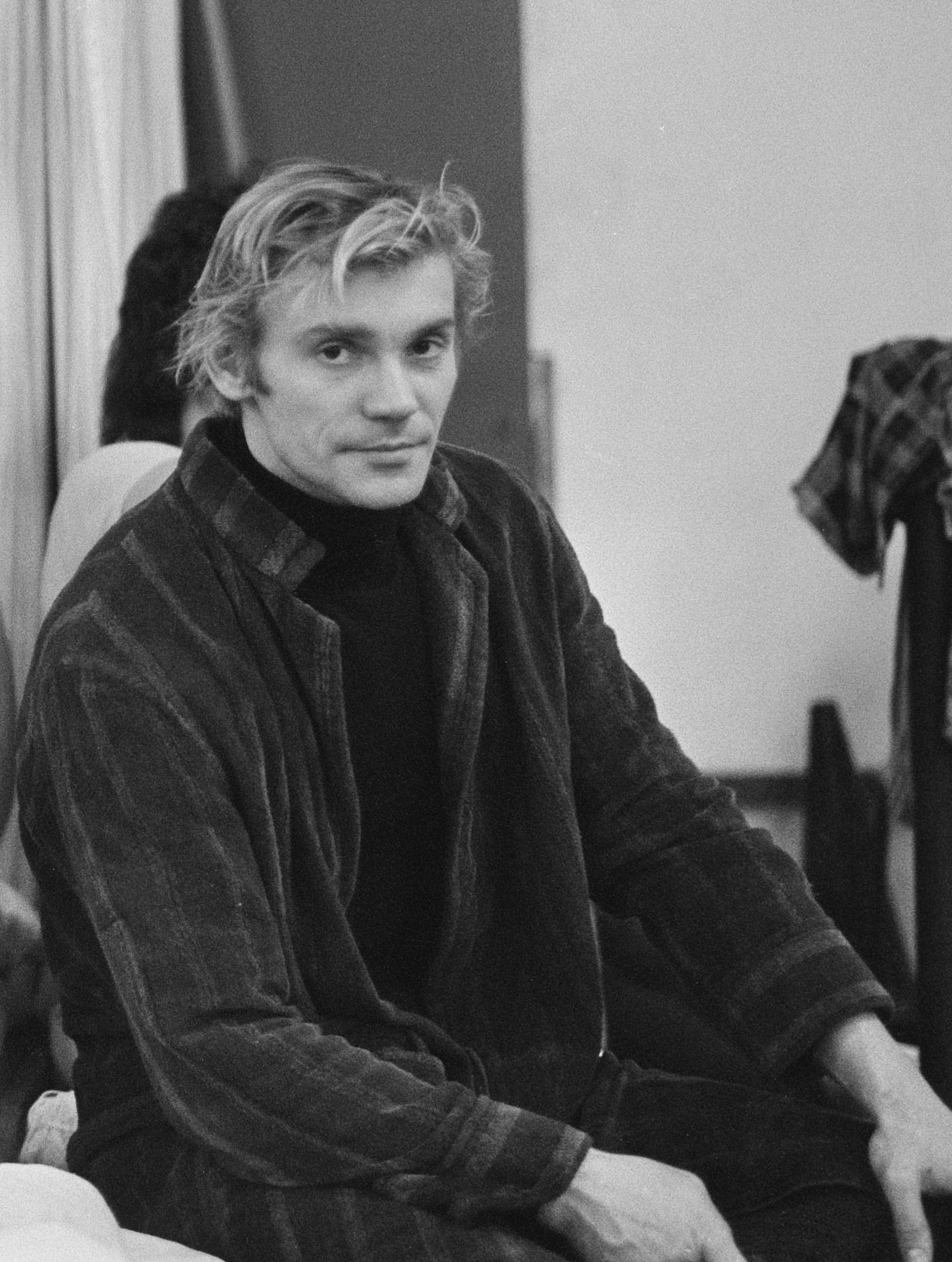 Russische danspaar Ekaterina Maximowa en Wladimir Wasiljew bij Nationaal Ballet tijdens repetitie